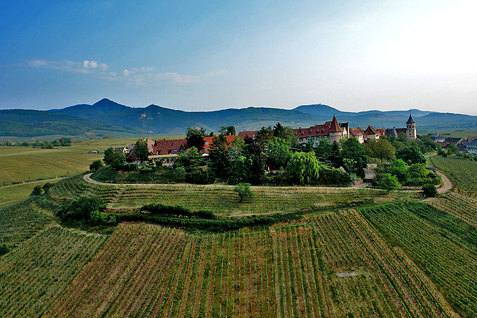 Photo aérienne de Zellenberg